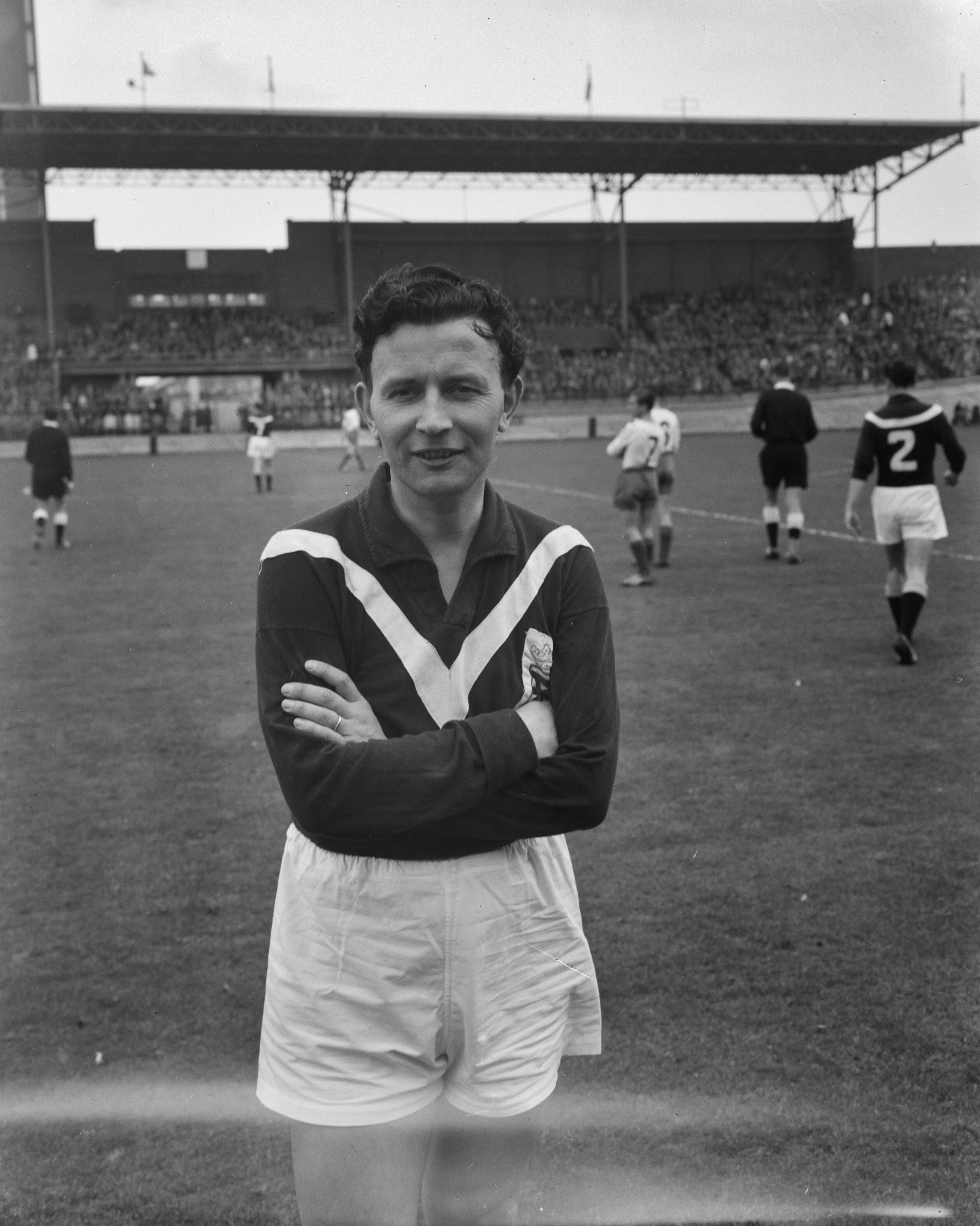 Collectie / Archief : Fotocollectie Anefo Reportage / Serie : [ onbekend ] Beschrijving : SC Enschede tegen DWSA 4-2, Abe Lenstra Datum : 18 april 1960 Persoonsnaam : Lenstra, Abe Instellingsnaam : SC Enschede Fotograaf : Rossem, Wim van / Anefo Auteursrechthebbende : Nationaal Archief Materiaalsoort : Negatief (zwart/wit) Nummer archiefinventaris : bekijk toegang 2.24.01.04 Bestanddeelnummer : 911-1766